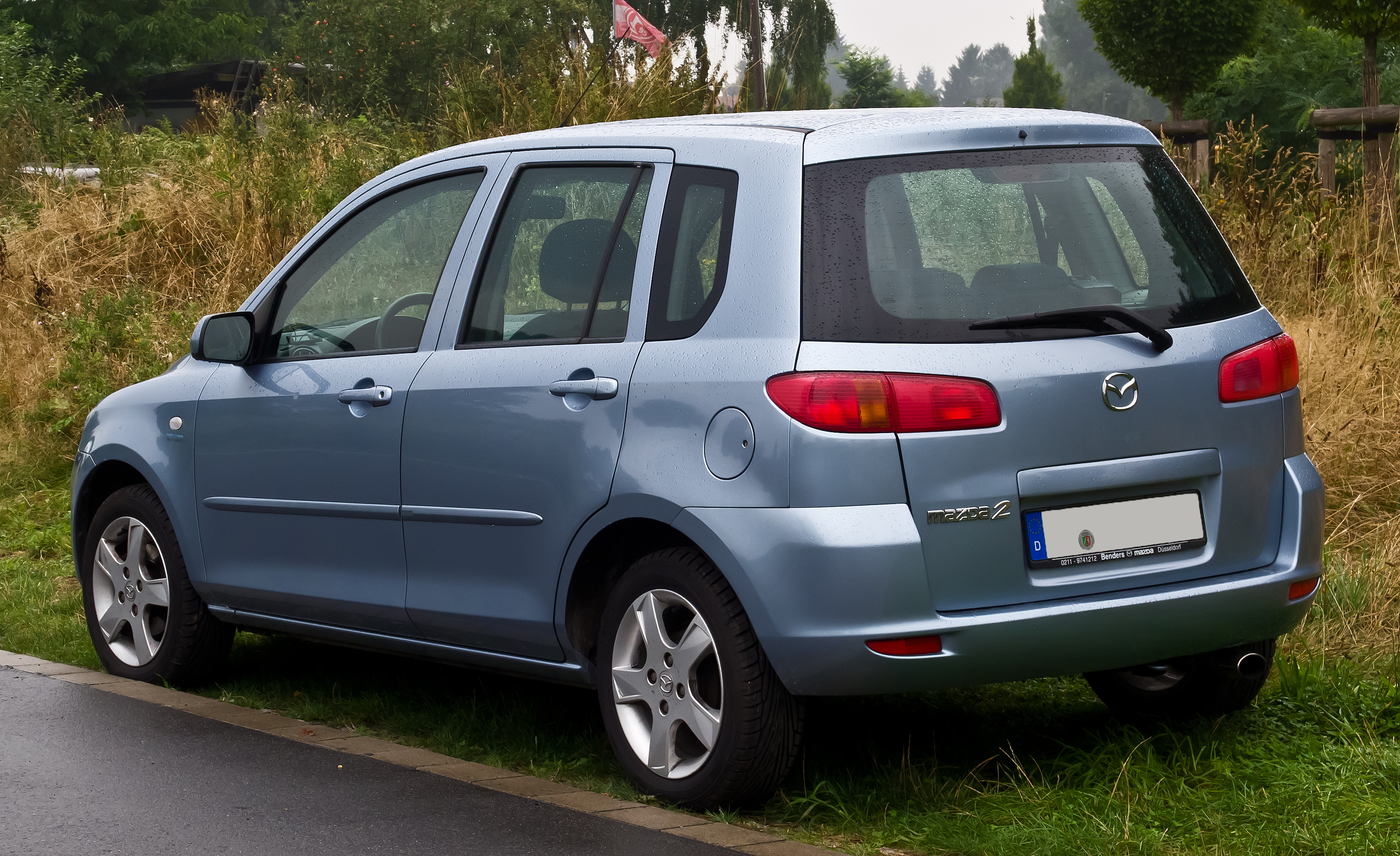 Mazda2 (DY)